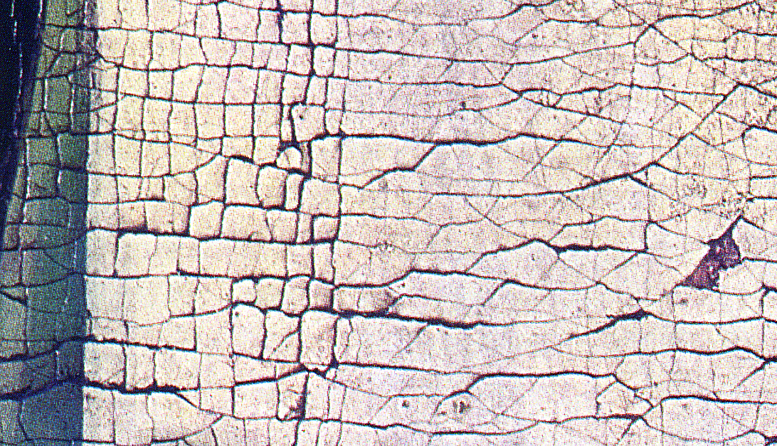 Um ein altes Gemälde mit Craquelé vorzutäuschen, wurde die Bildschicht "gebrochen".